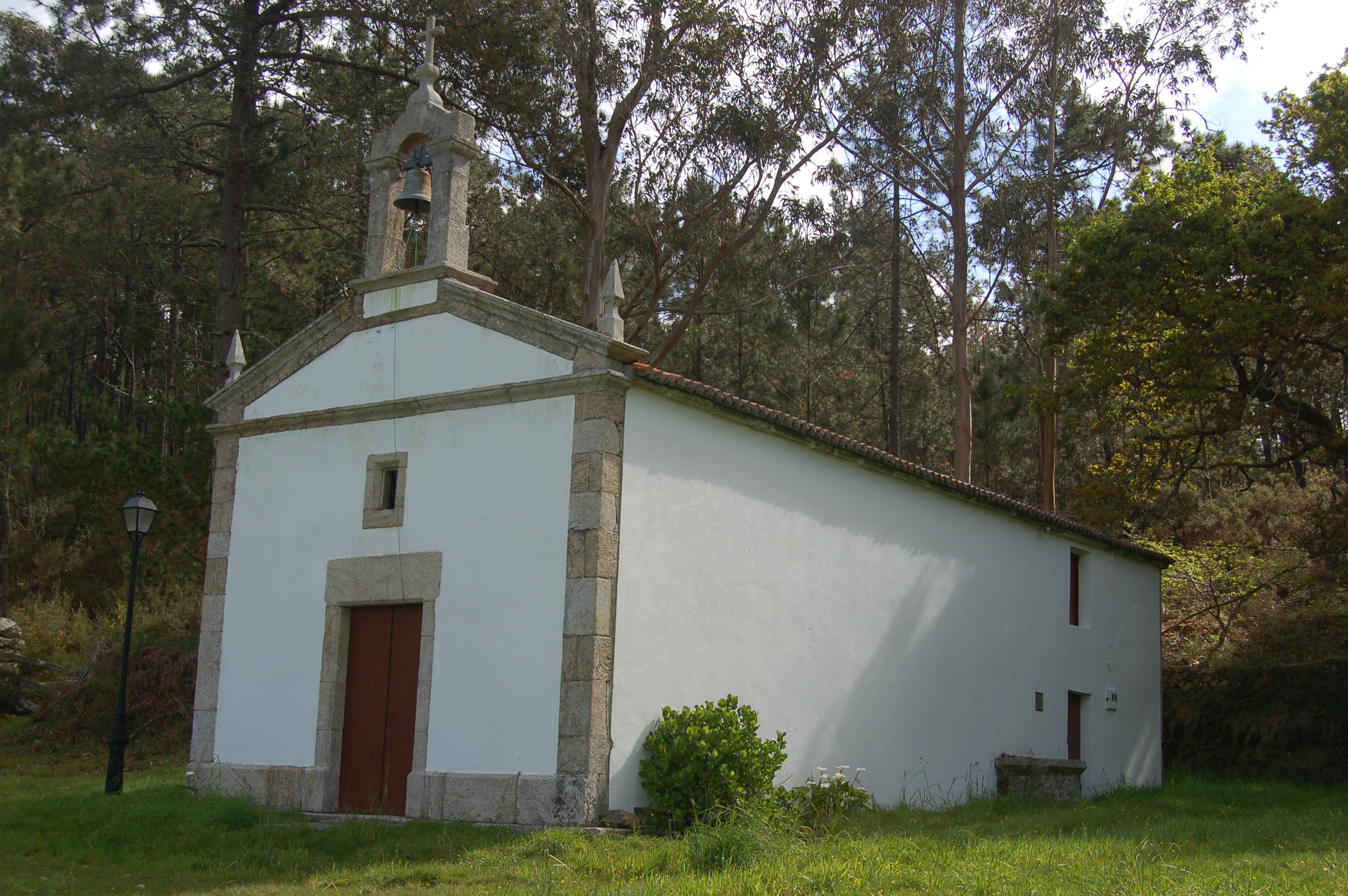 Igrexa parroquial de San Xoán de Bardullas (Muxía).